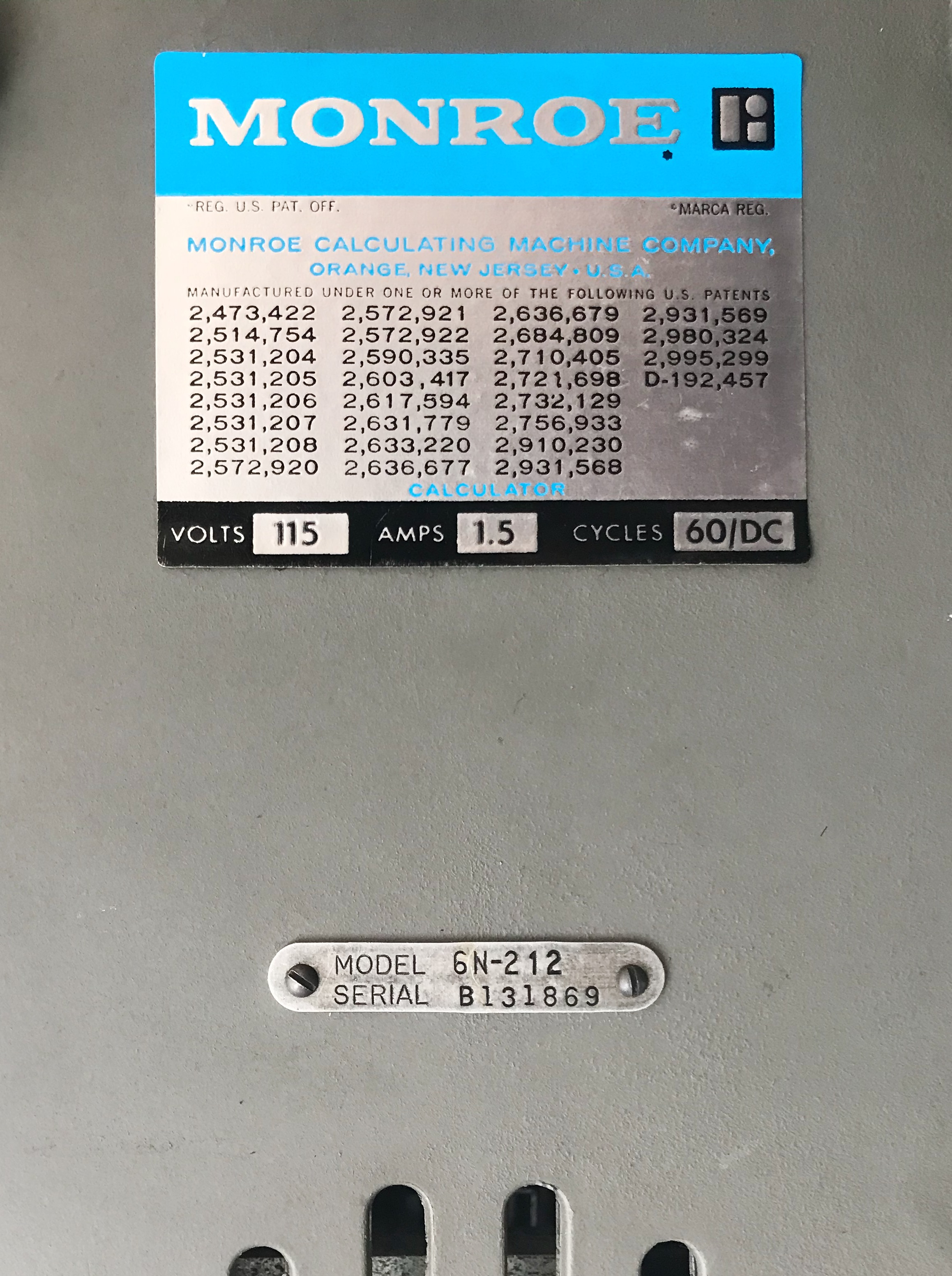 東京電機大学収蔵品